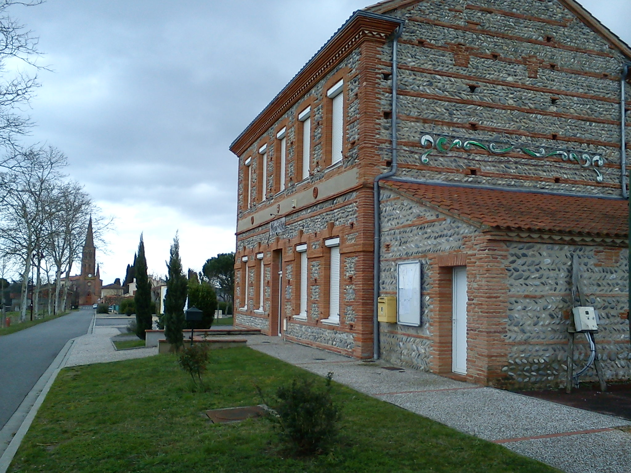 Montaut (Haute-Garonne), France) : La mairie construite aux alentours de 1875 en rangées de galets disposés en arête-de-poisson alternance avec des rangées de brique.